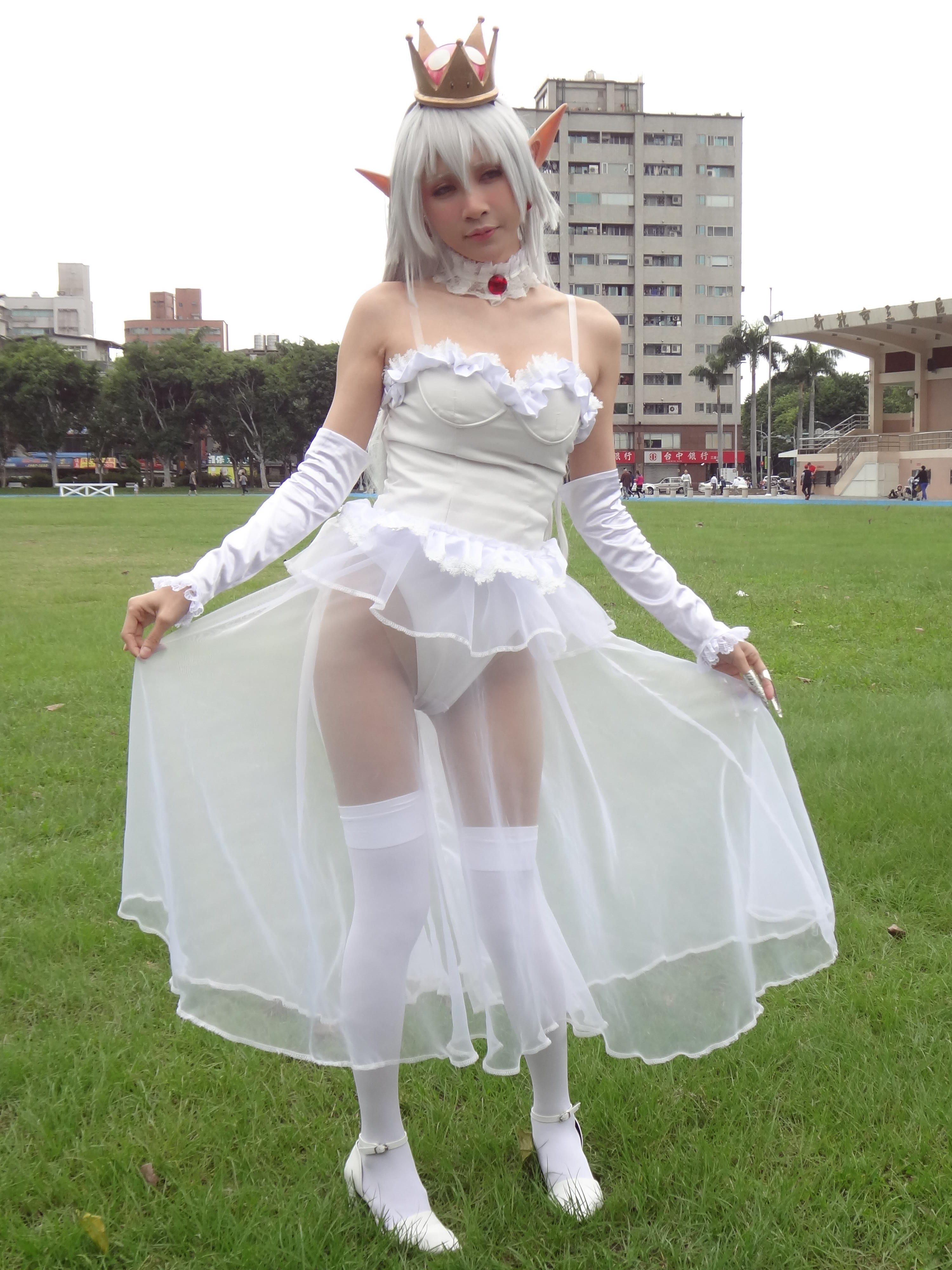 第5屆漫創地平線，新北市三重區綜合運動場田徑場草皮，餓小璇cosplay《超級瑪利歐兄弟》幽靈姬。